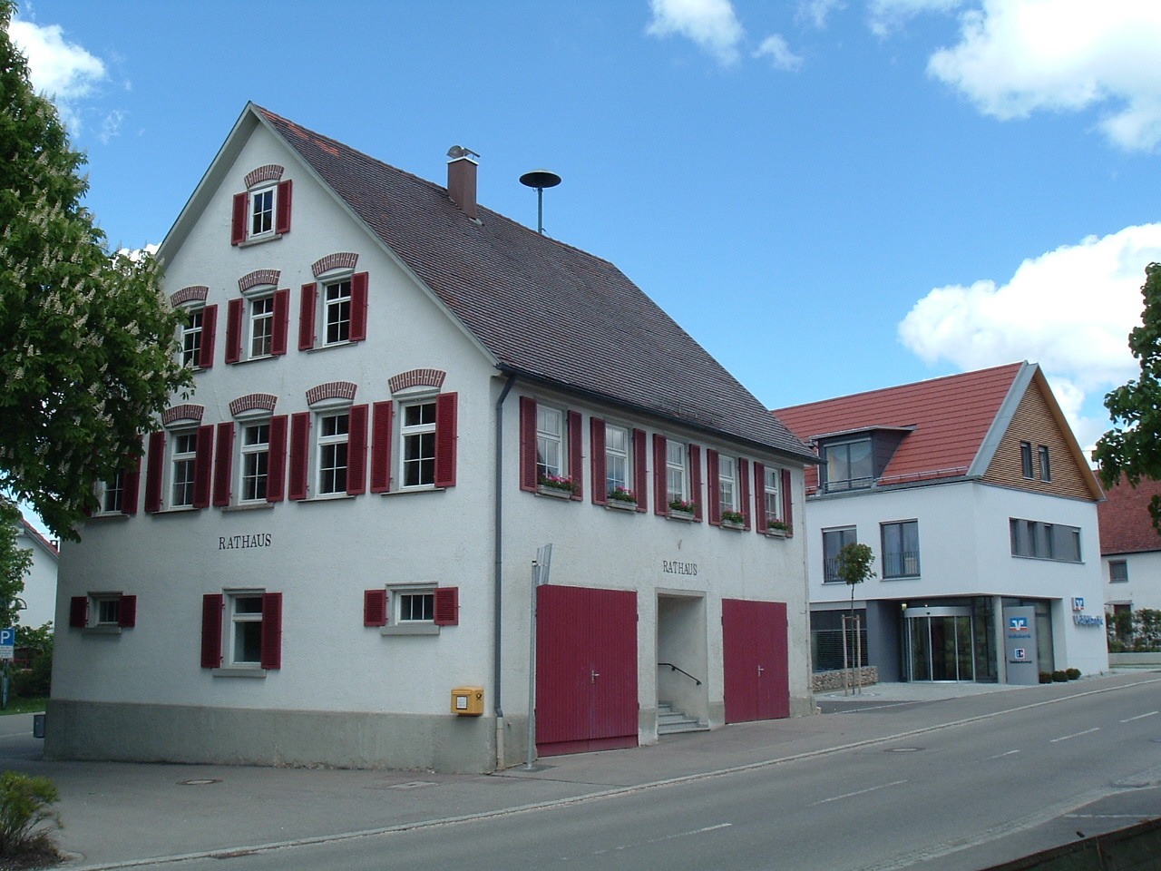 Rathaus in Machtolsheim, im Hintergrund Volksbankgebäude